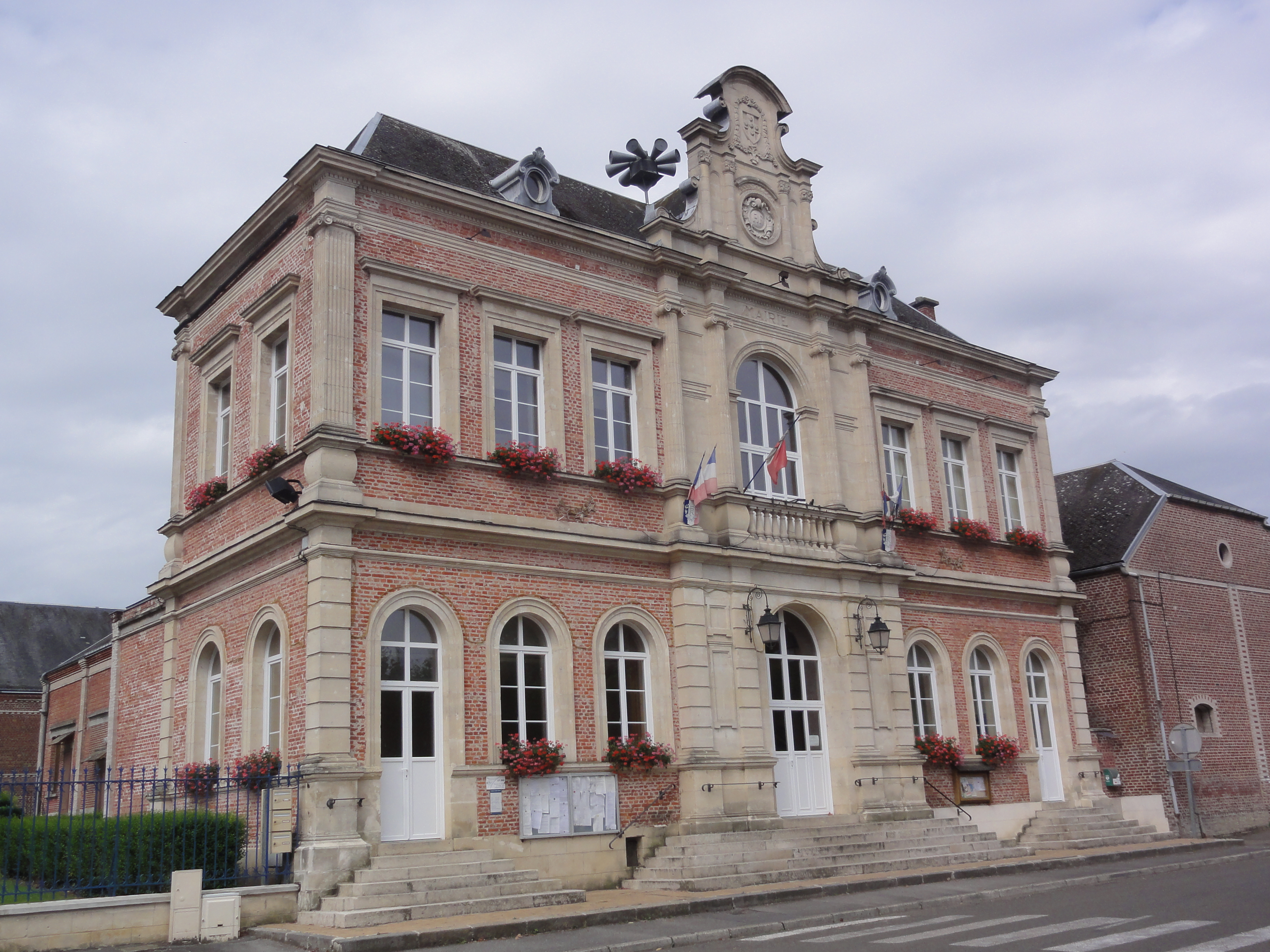 Saint-Simon (Aisne) mairie